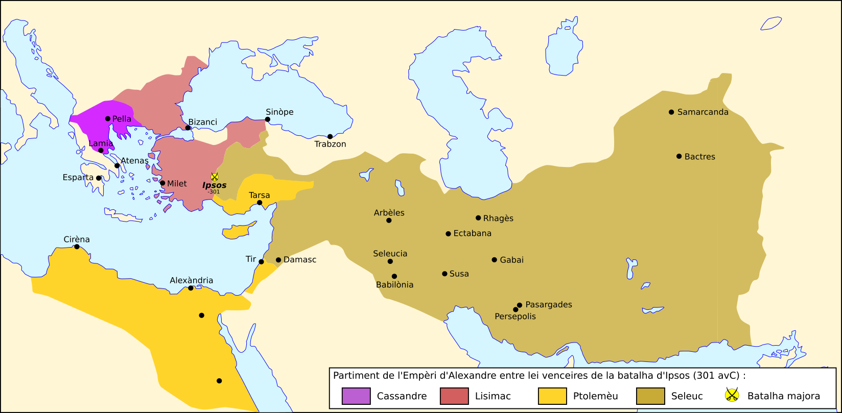 Partiment de l'Empèri après la batalha d'Ipsos (301 avC)